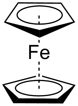 Ferroceen